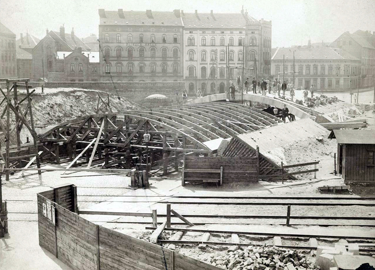 Wohl aus dem Bestand des Historischen Museums Hannover stammt dieses recht hochaufgelöste Digitalisat einer Fotografie eines nicht genannten Künstlers aus dem Jahr 1878 von den Bauarbeiten für die erste Eisenbahnüberführung (EÜ) über die Königstraße in Hannover, Blickrichtung etwa von der Höhe der heutigen Augustenstraße in Richtung Thielenplatz, Lavesstraße und Prinzenstraße, ganz links ist die Alexanderstraße zu sehen. Die Bauarbeiter mit Hüten und mit ihnen einige Ingenieure mit Zylinder wissen genau, dass sie gerade fotografiert werden und posieren deshalb über dem ersten bereits fertiggestellten Gewölbebogen aus gelben Klinkersteinen über der Königstraße. Hinter ihnen ist das Eckgebäude des später mit Werbung der Hannoverschen Fahnenfabrik von Franz Reinecke versehenen Unternehmens zu erkennen ...